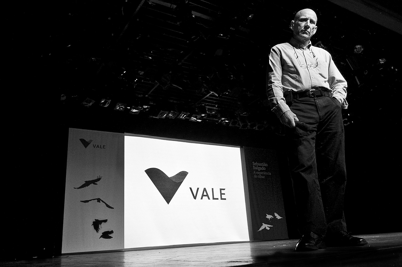 Ousando tirar uma foto preto e branco do Sebastião Salgado, durante a palestra realizada dia 7.09.